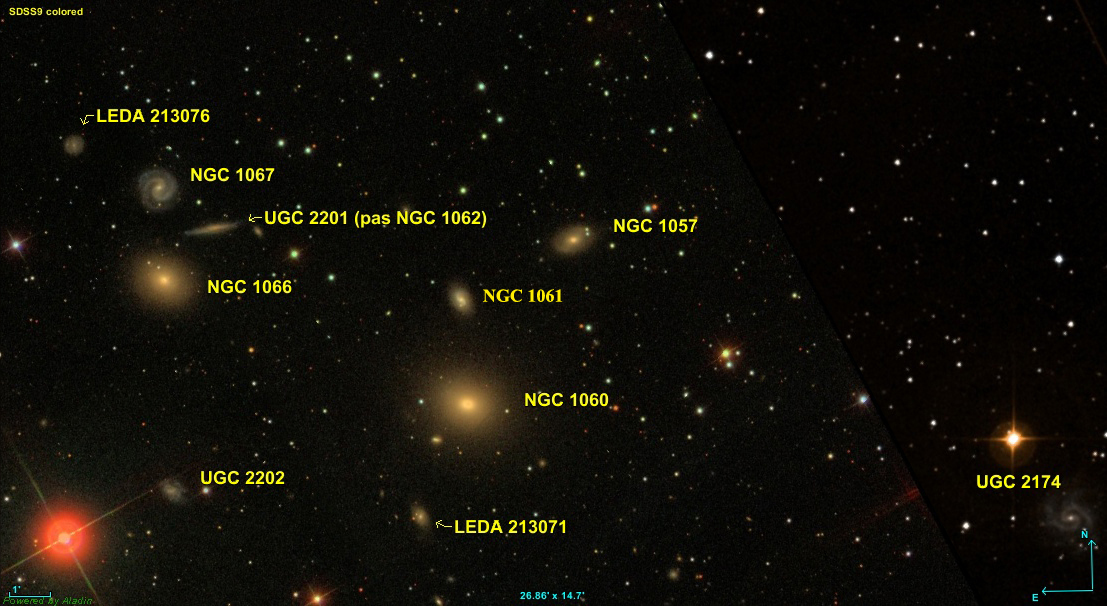 Image réalisée avec Aladin et la fusion de données DSS et SDSS